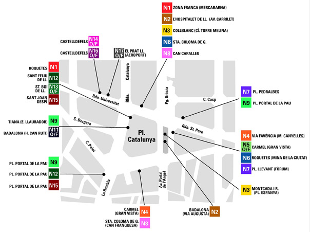 Mapa con la situación de las líneas Nitbus en la Plaza de Catalunya